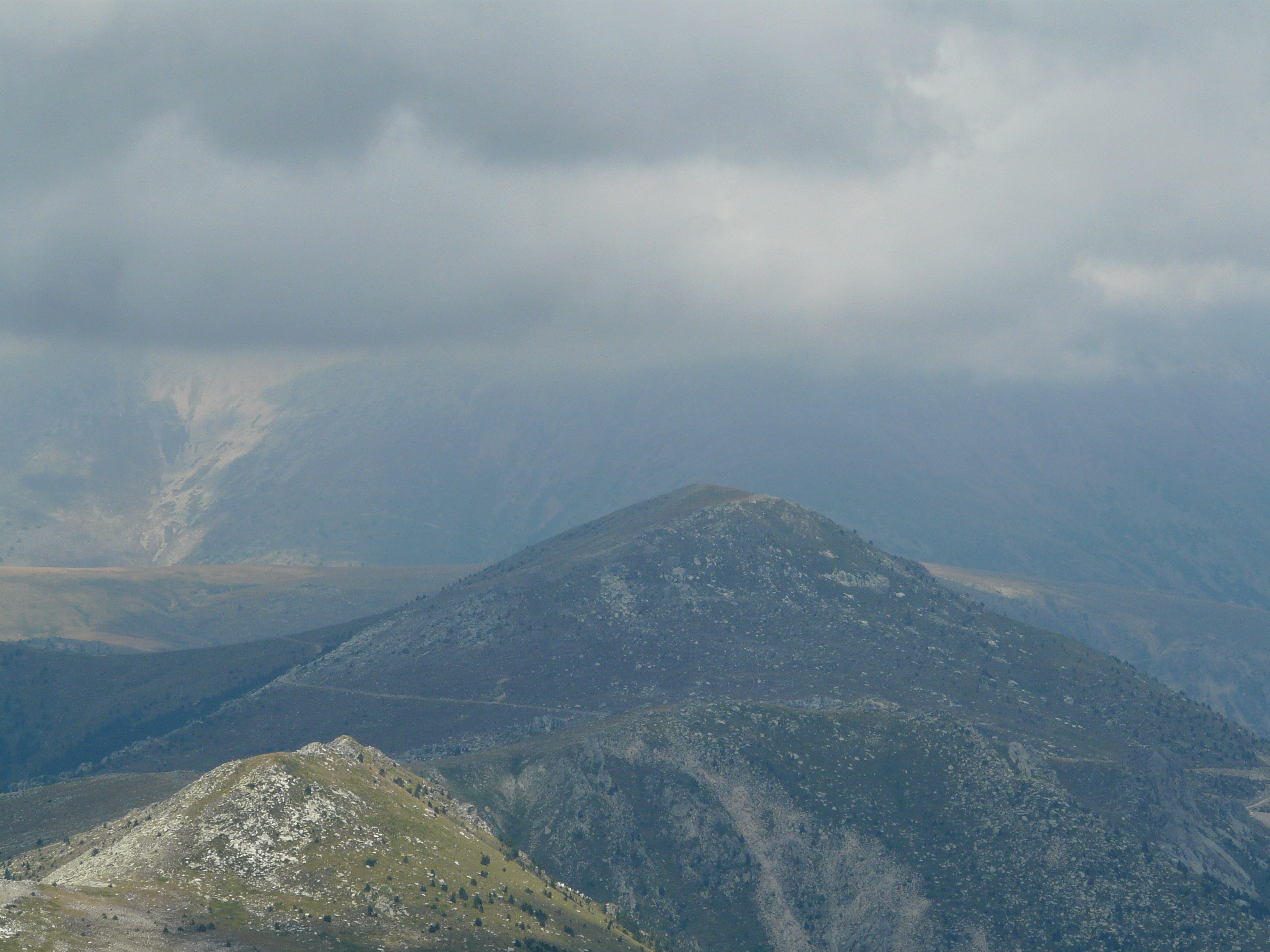 Fotografia presa en una ascensió al Costabona des de la Collada Fonda.